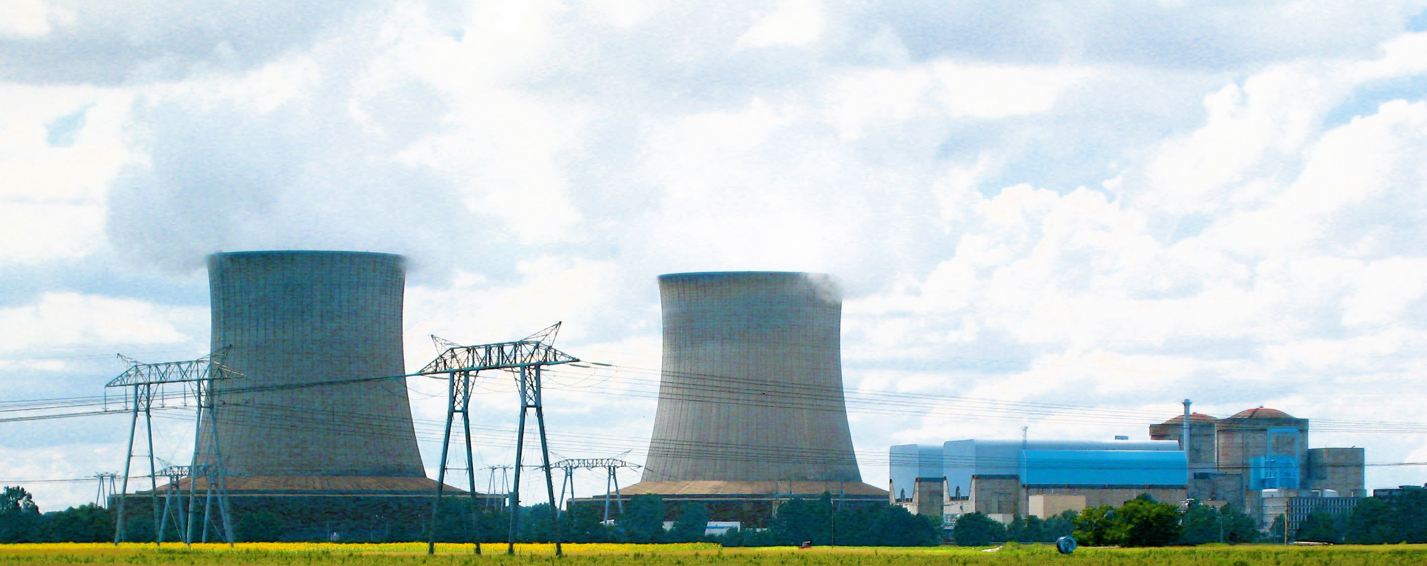 Zoom sur la Centrale nucléaire de Saint Laurent des Eaux, France